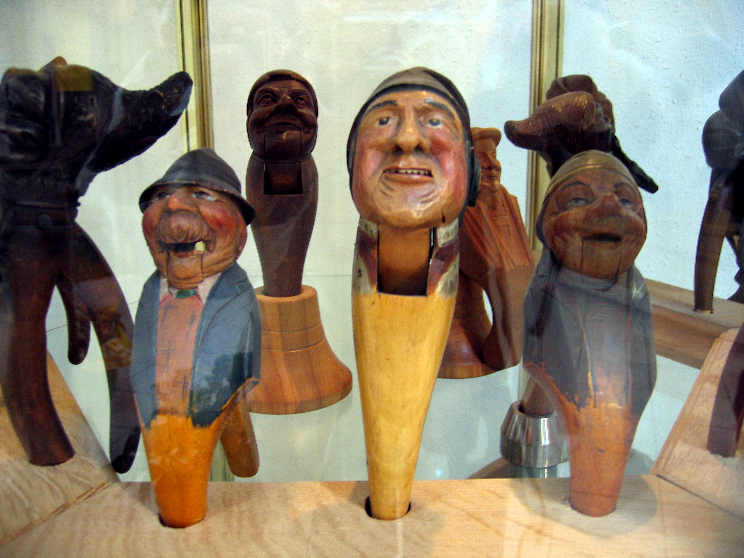 Nussknackermuseum Neuhausen/Erzgebirge